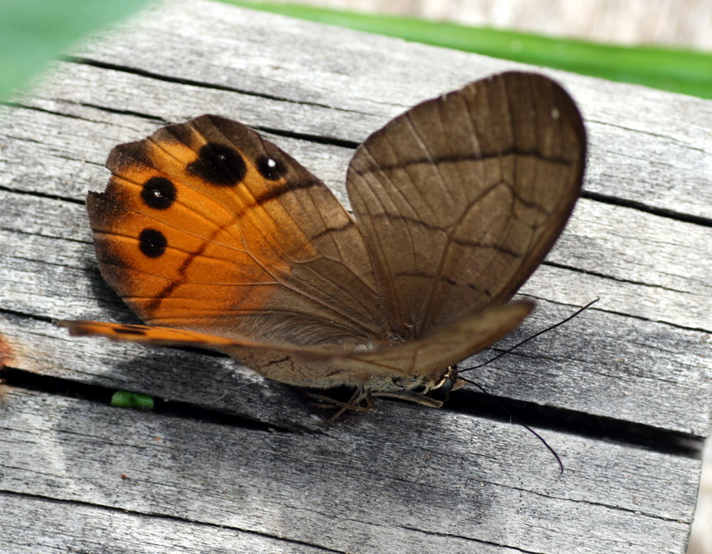 Peru. Iquitos area. Aug. 2008